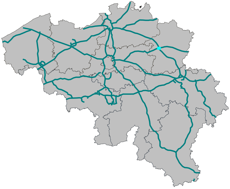 Locatie Knooppunt Lummen